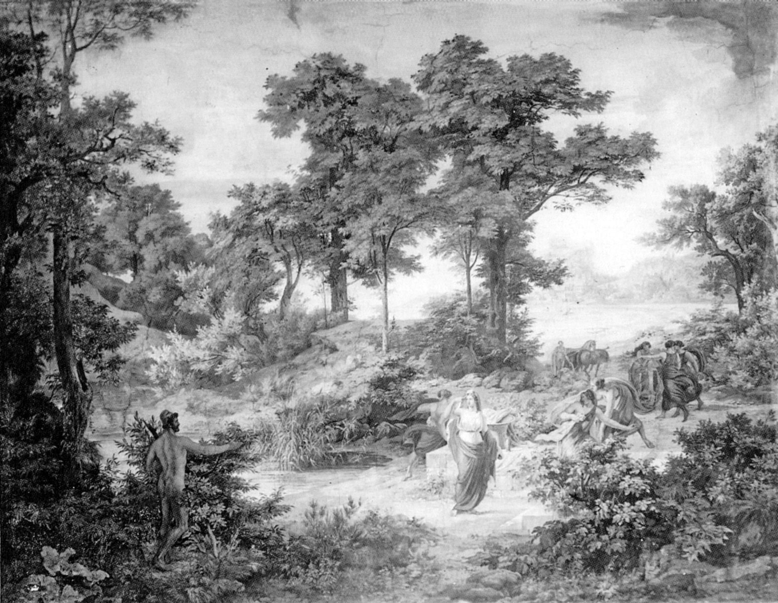 Odysseus-Zyklus von Friedrich Preller d.Ä. im Römischen Haus in Leipzig: Odysseus bei Nausikaa